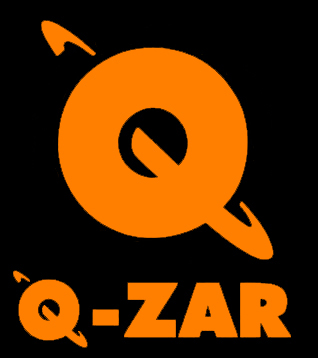 Q-Zar logotype